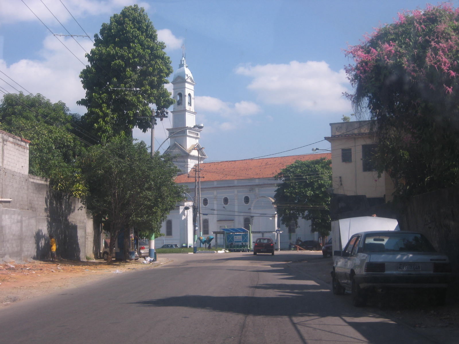 Vista do bairro de Agostinho Porto, em São João de Meriti, RJ.